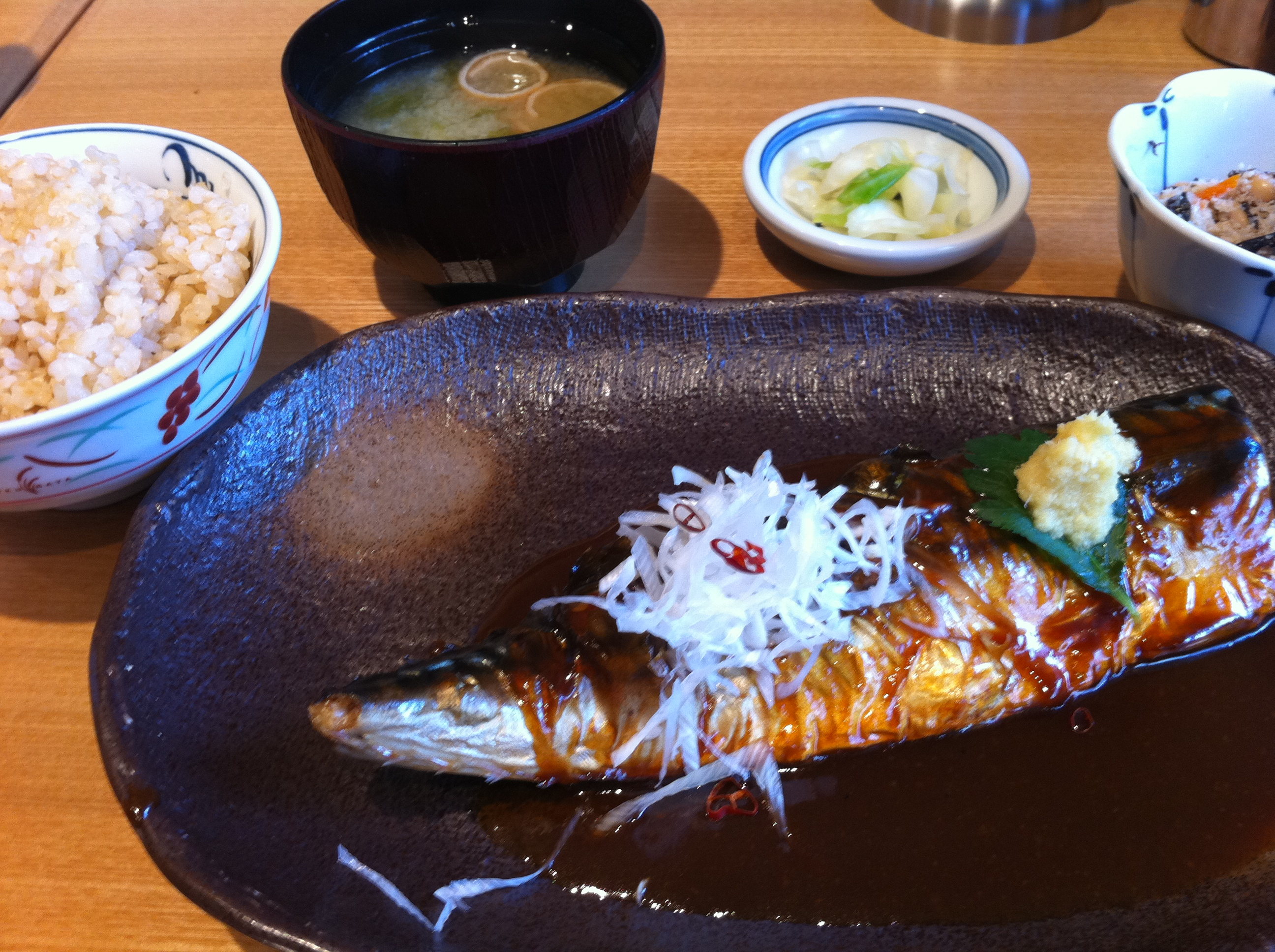 サバ味噌定食